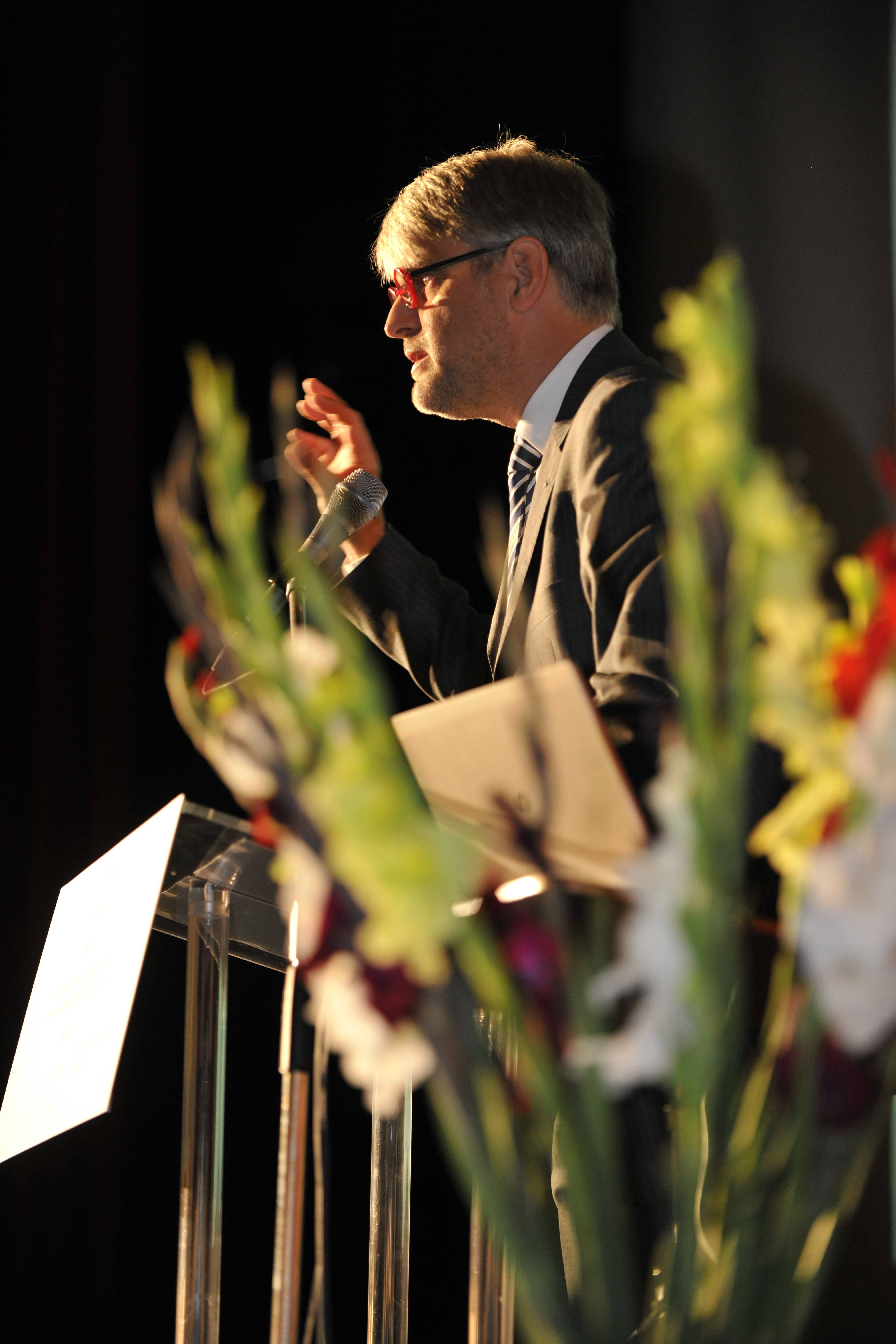 Dienstag, 8. Oktober: Kirchgemeindehaus Neumünster. Evangelische Theologie im heutigen Kontext: Ulrich Körtner, Wien: Exklusiver Glaube. Das Vierfache "Allein" reformatorischer Theologie